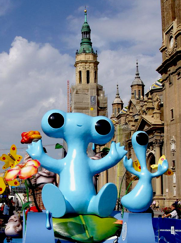 Muñeco gigante de Fluvi la mascota de la Expo 2008 junto a El Pilar. Zaragoza, España